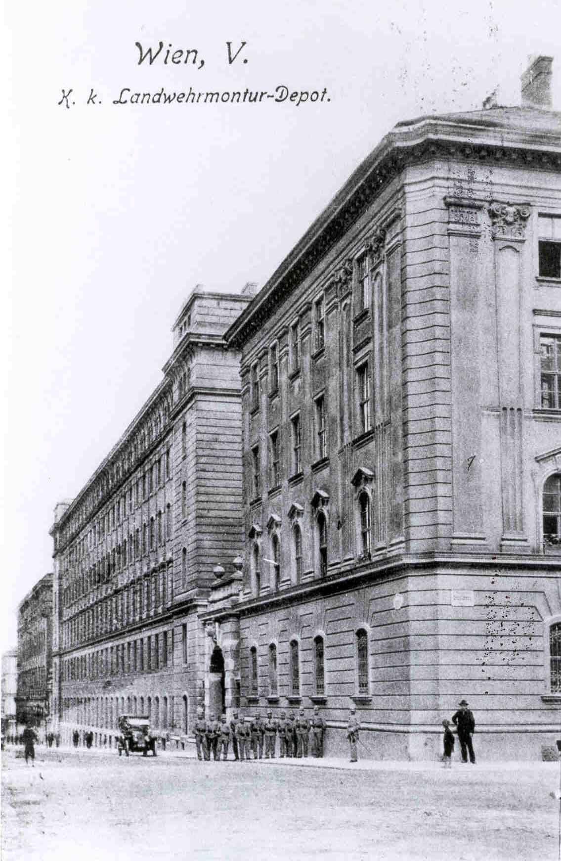 ehem. Landwehrkaserne und heutige HTL Spengergasse